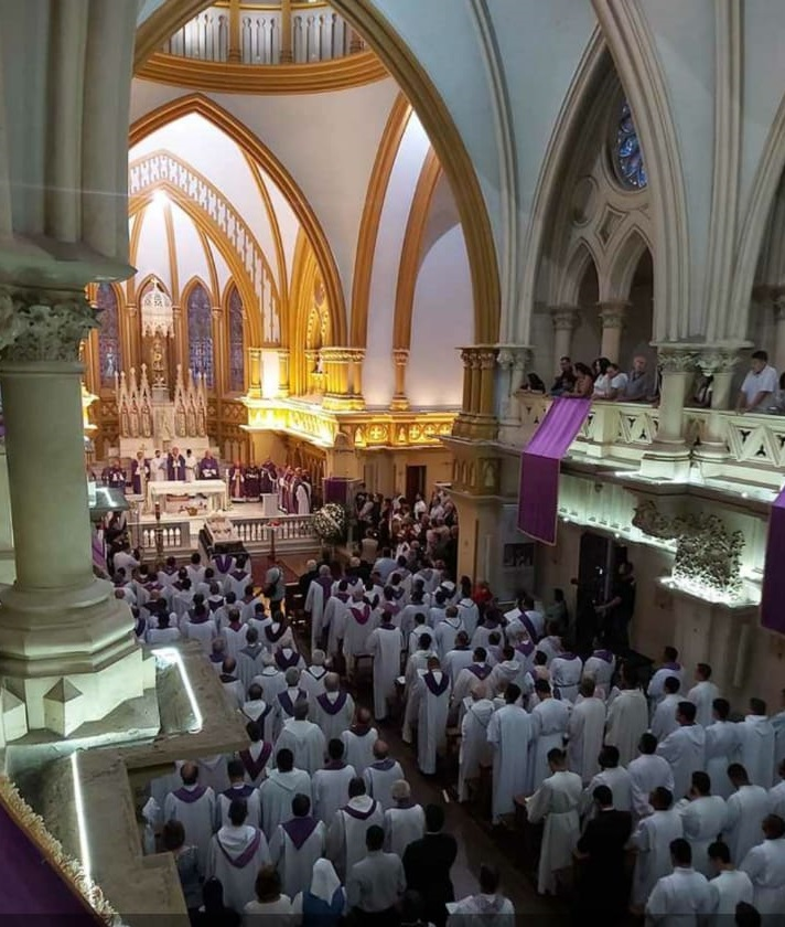 Exéquias do Cardeal